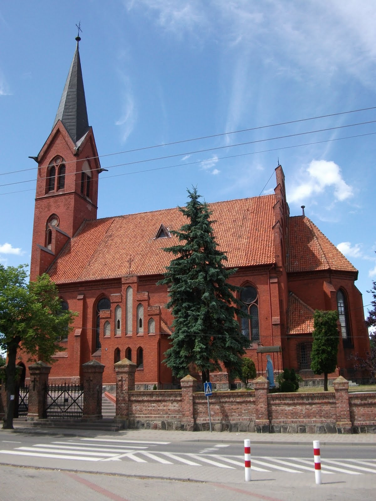 Biskupiec, ul. Kwiatowa 16 - rzymskokatolicki kościół parafialny p.w. św. Jana Nepomucena i Matki Boskiej Różańcowej, 1892-1894